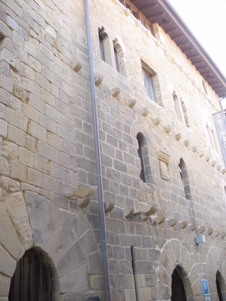 Getaria (Gipúzkoa)